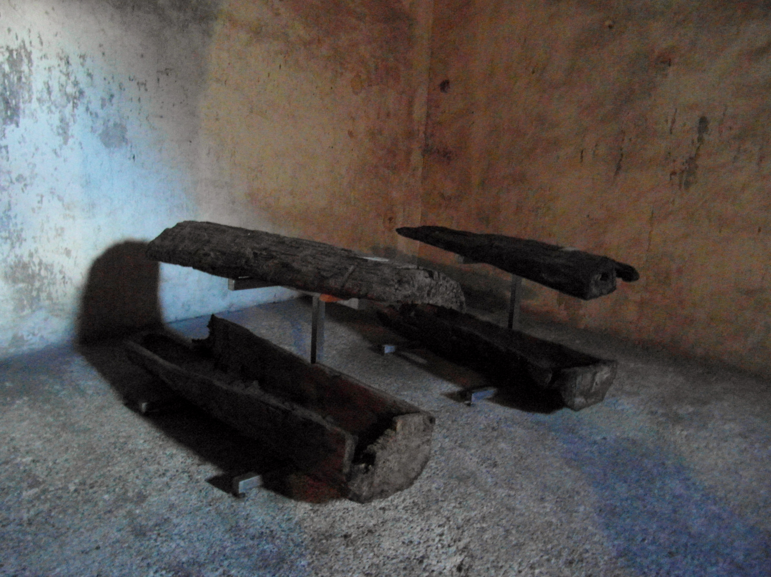 Castel Tasso bare risalenti al 40 d.C.